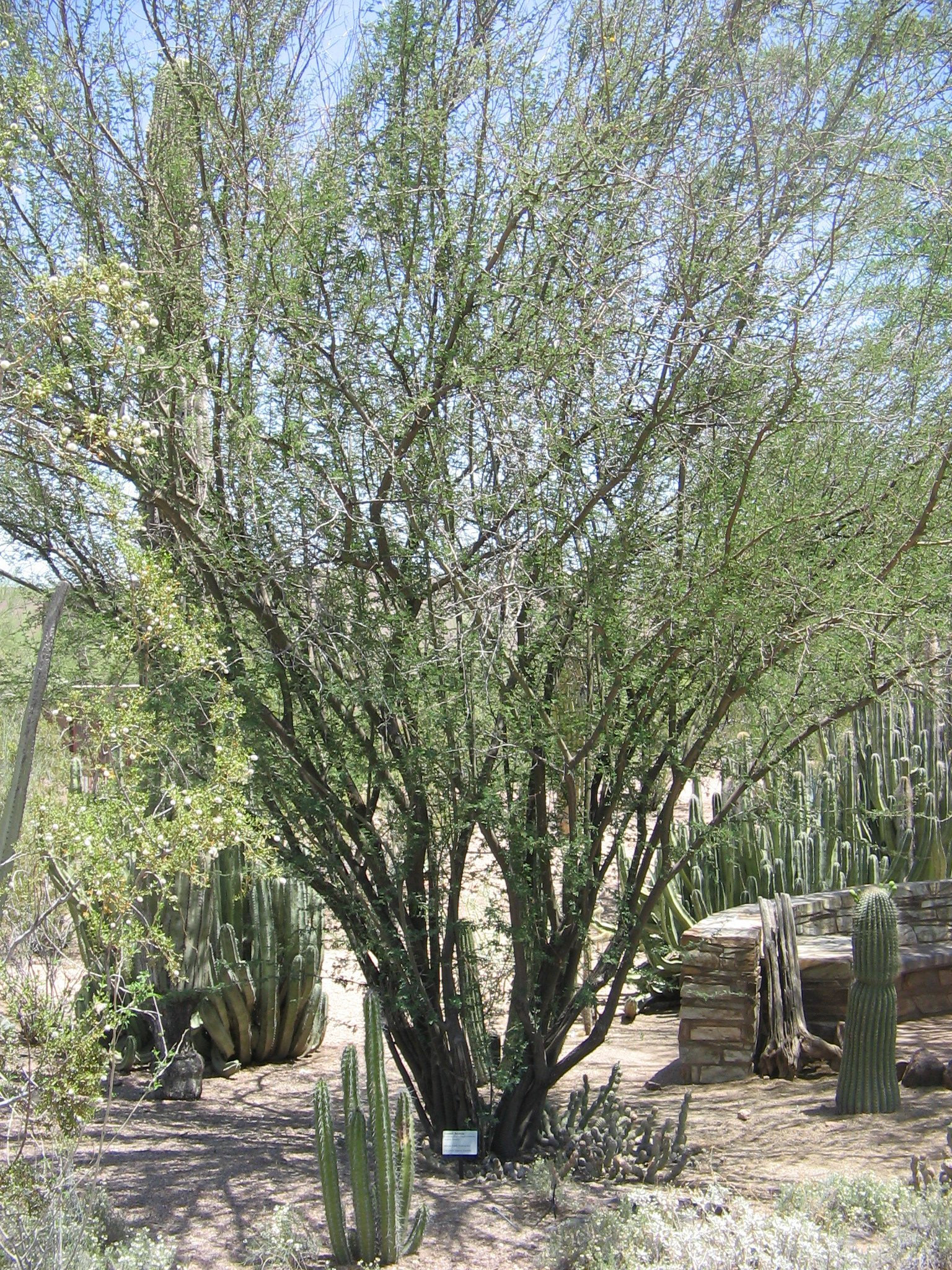 Acacia farnesiana Habit (synonym Acacia minuta) Phoenix Desert Botanical Gardens